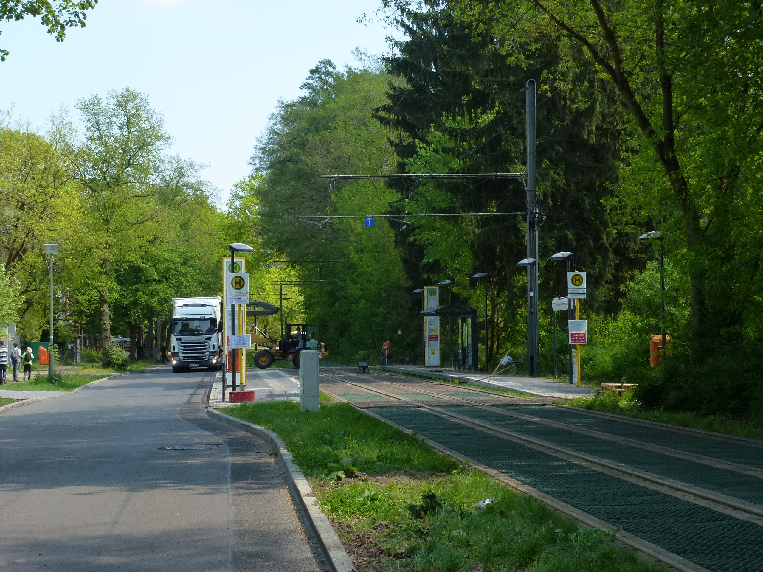 Berlin-Grünau Regattastraße Haltestelle Sportpromenade